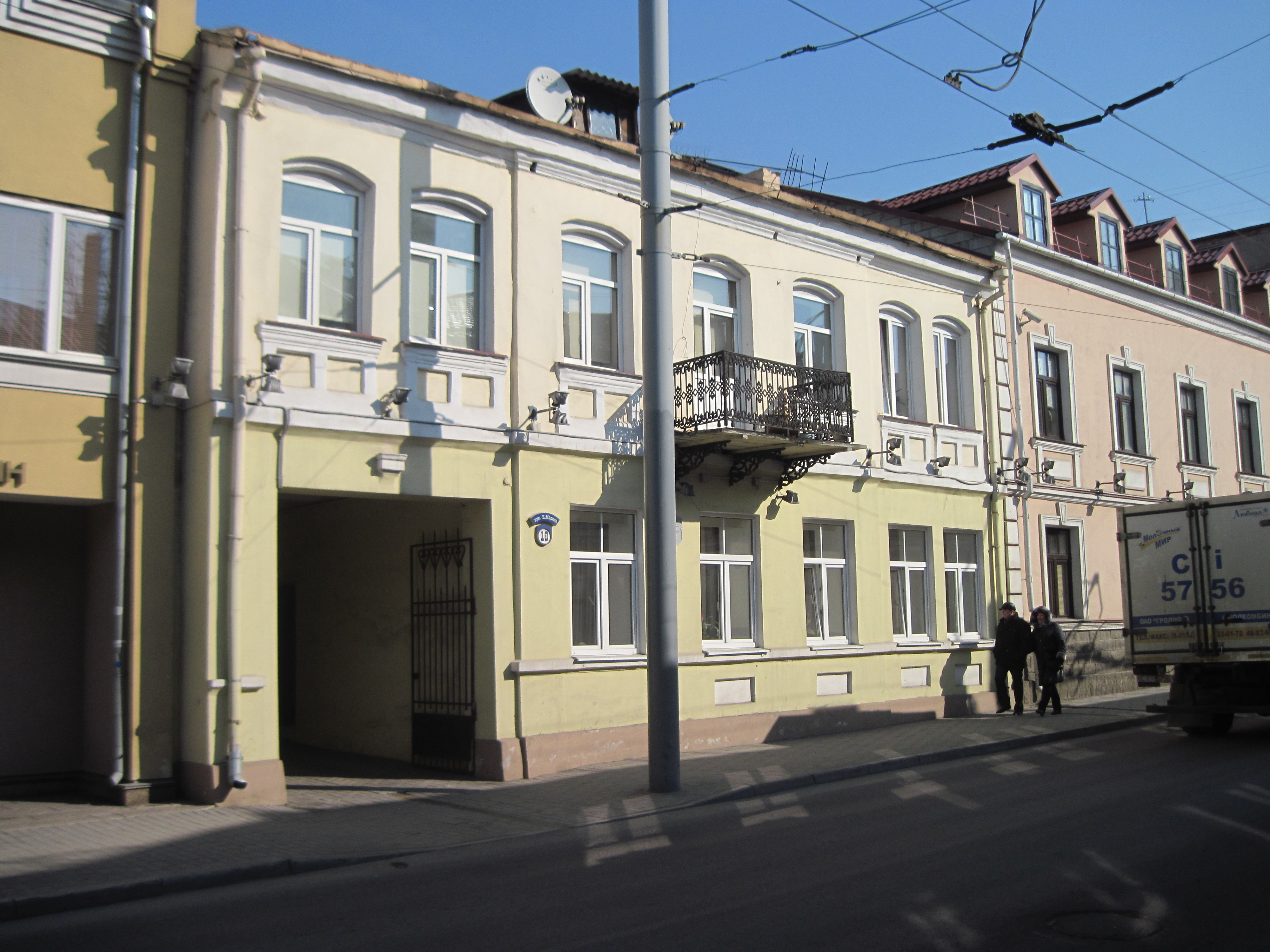 Забудова гістарычнага цэнтра Гродна. Вуліца К. Маркса, 18.